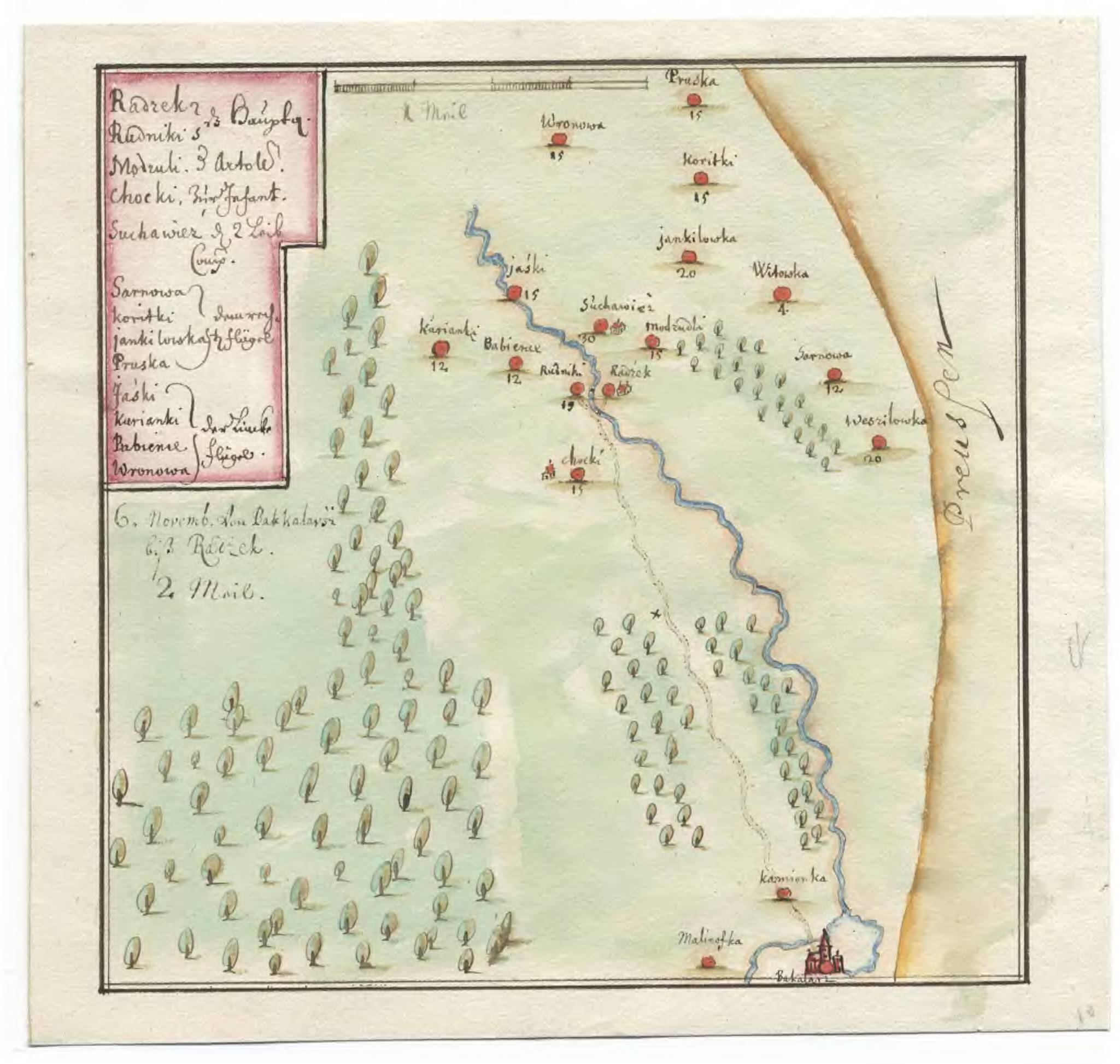 Беларуская (тарашкевіца): Рачкі (Rački). Мапа ваколіцаў у бок Бакаларава (Bakałarava)